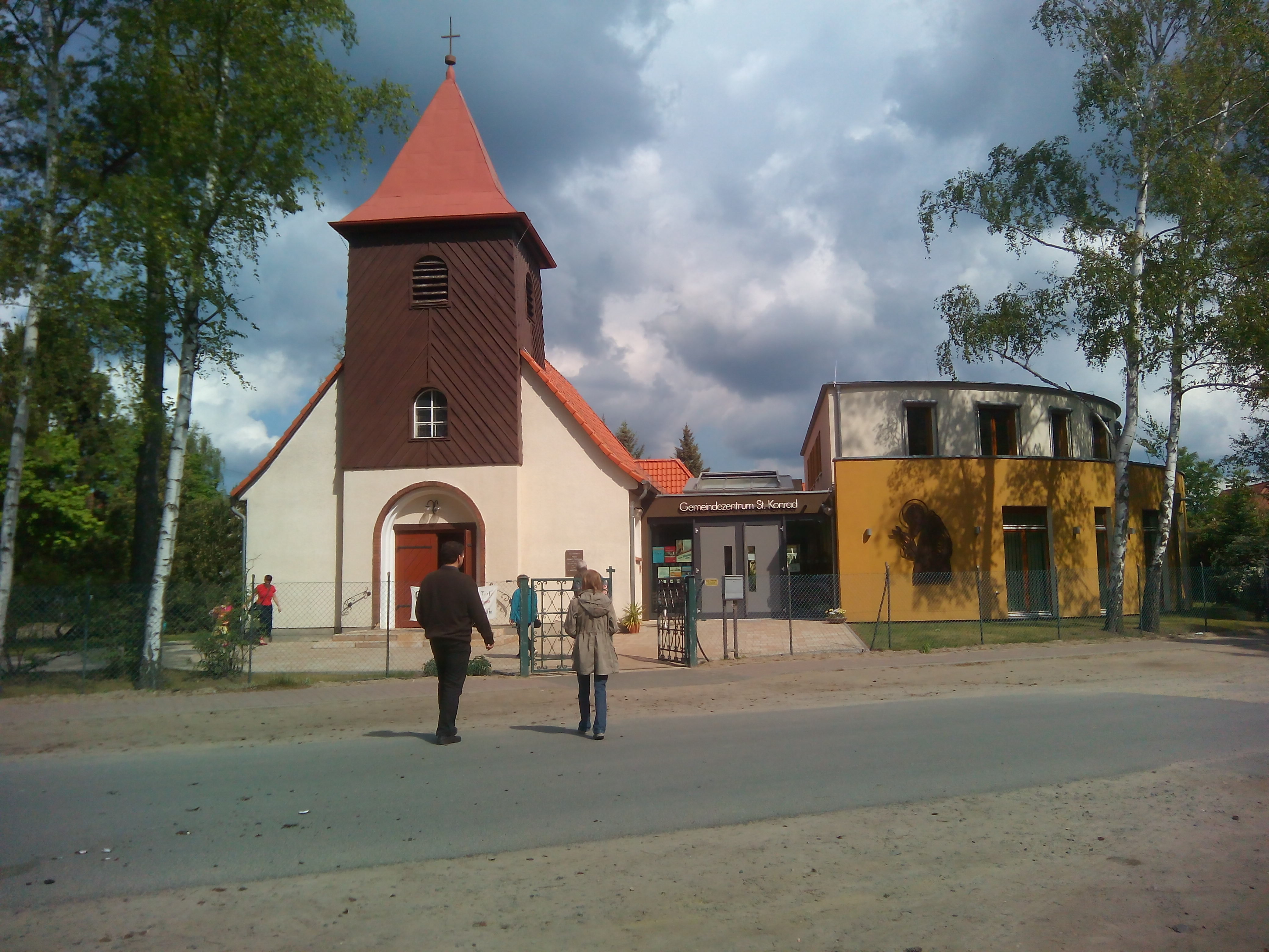 Die Kirche mit dem dazugehörigen Gemeindezentrum